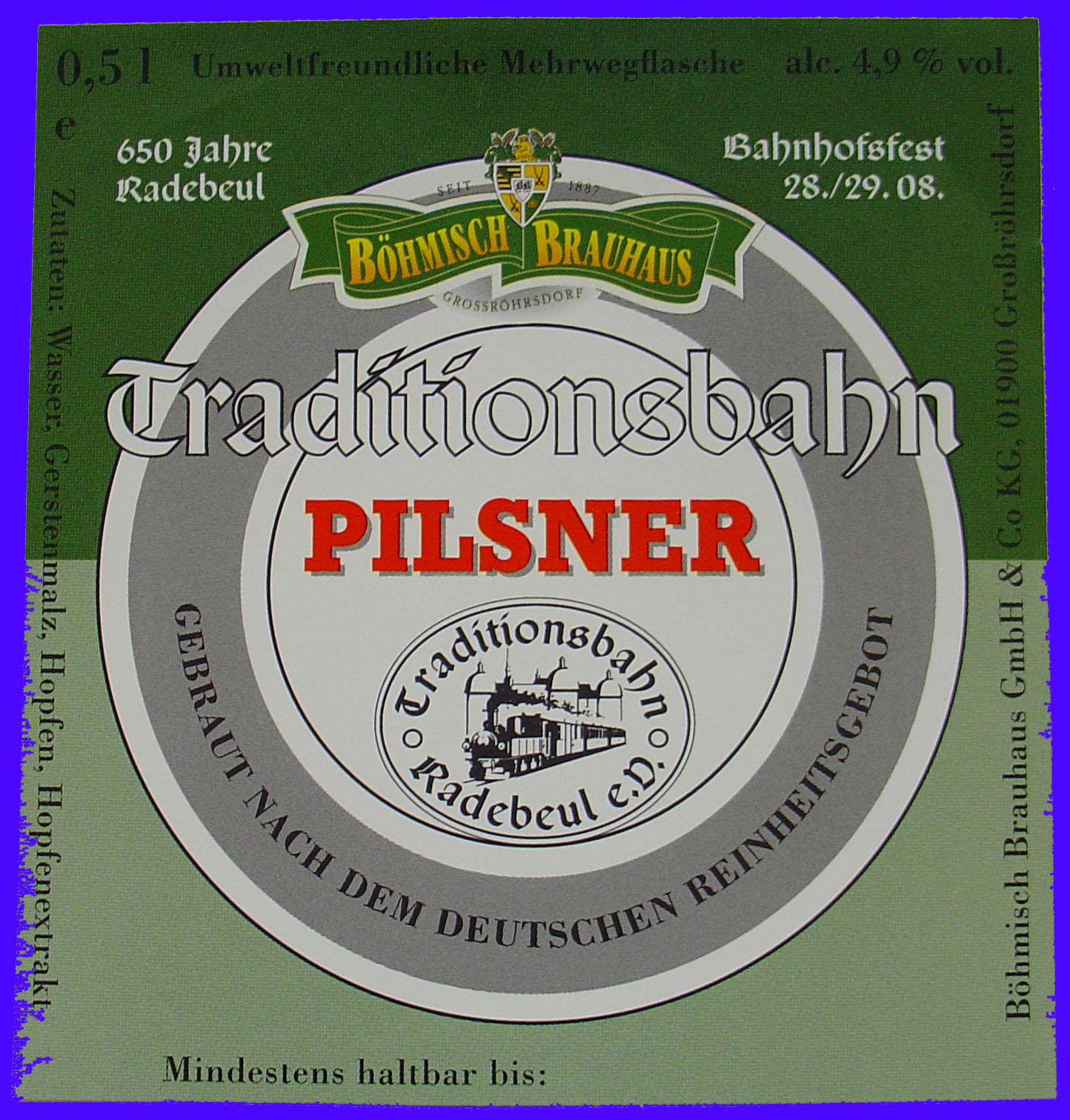 Traditionsbahn Pilsner, Böhmisch Brauhaus Großröhrsdorf, Etikett